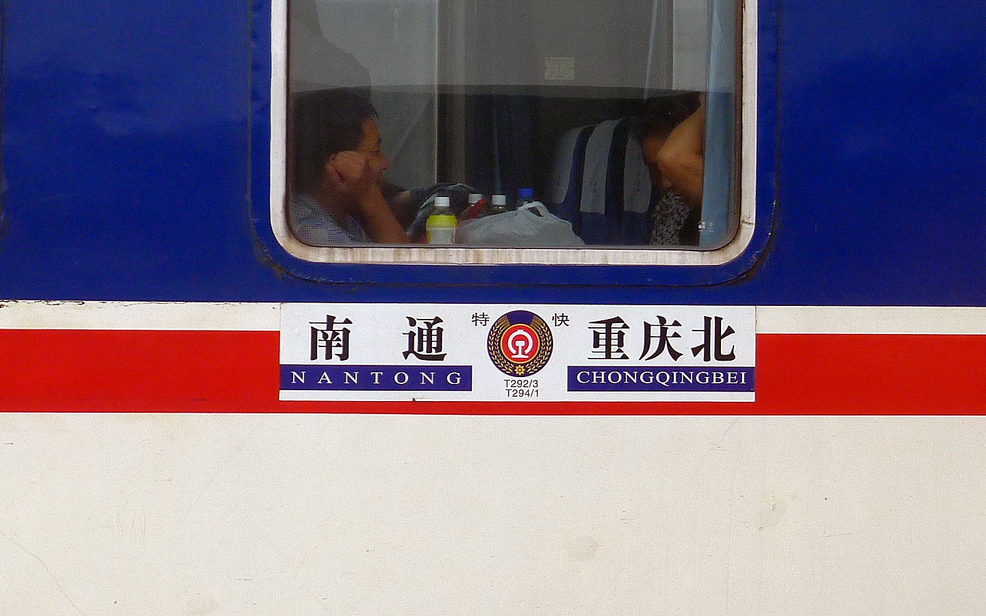 重庆北至南通T292/293、T294/291次列车水牌